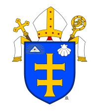 Erb žilinskej diecezy